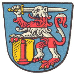 Wappen von Heubach (Odenwald) frühes 19.Jh